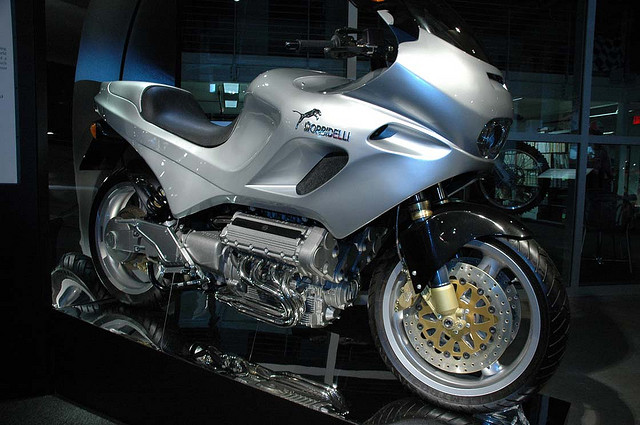 Morbidelli V8 at Barber Motorsport Museum